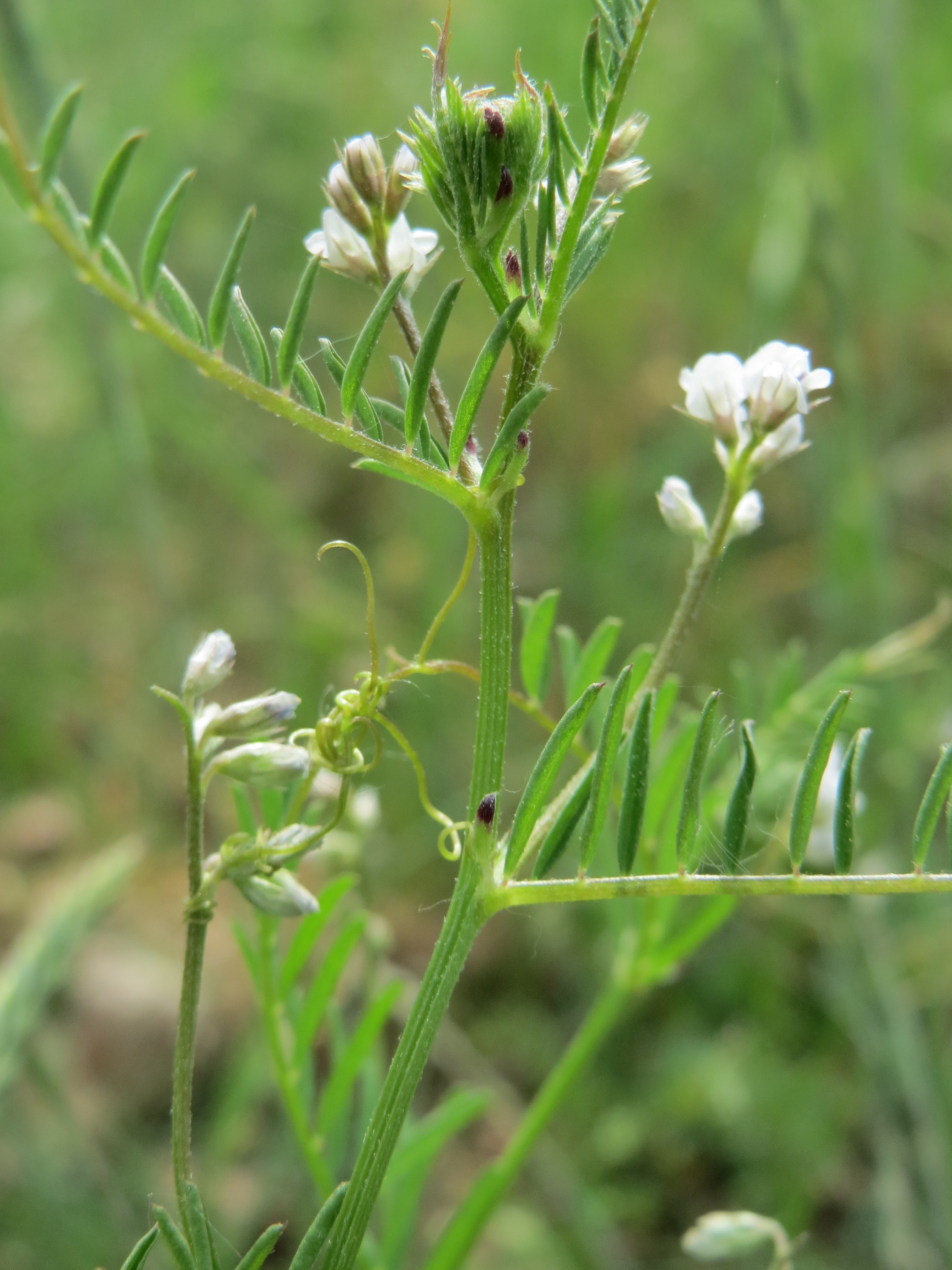 Rauhaarige Wicke (Vicia hirsuta) auf der Friedenshöhe (Naturschutzgebiet Oftersheimer Dünen)